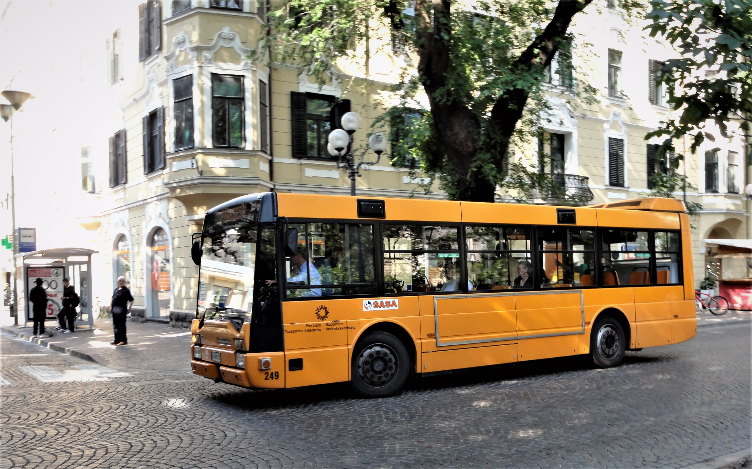 Bozen-Bolzano — Linienbus